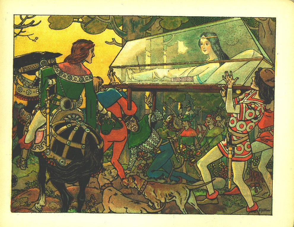 Franz Jüttner (1865–1925): Illustration from Sneewittchen, Scholz' Künstler-Bilderbücher, Mainz 1905